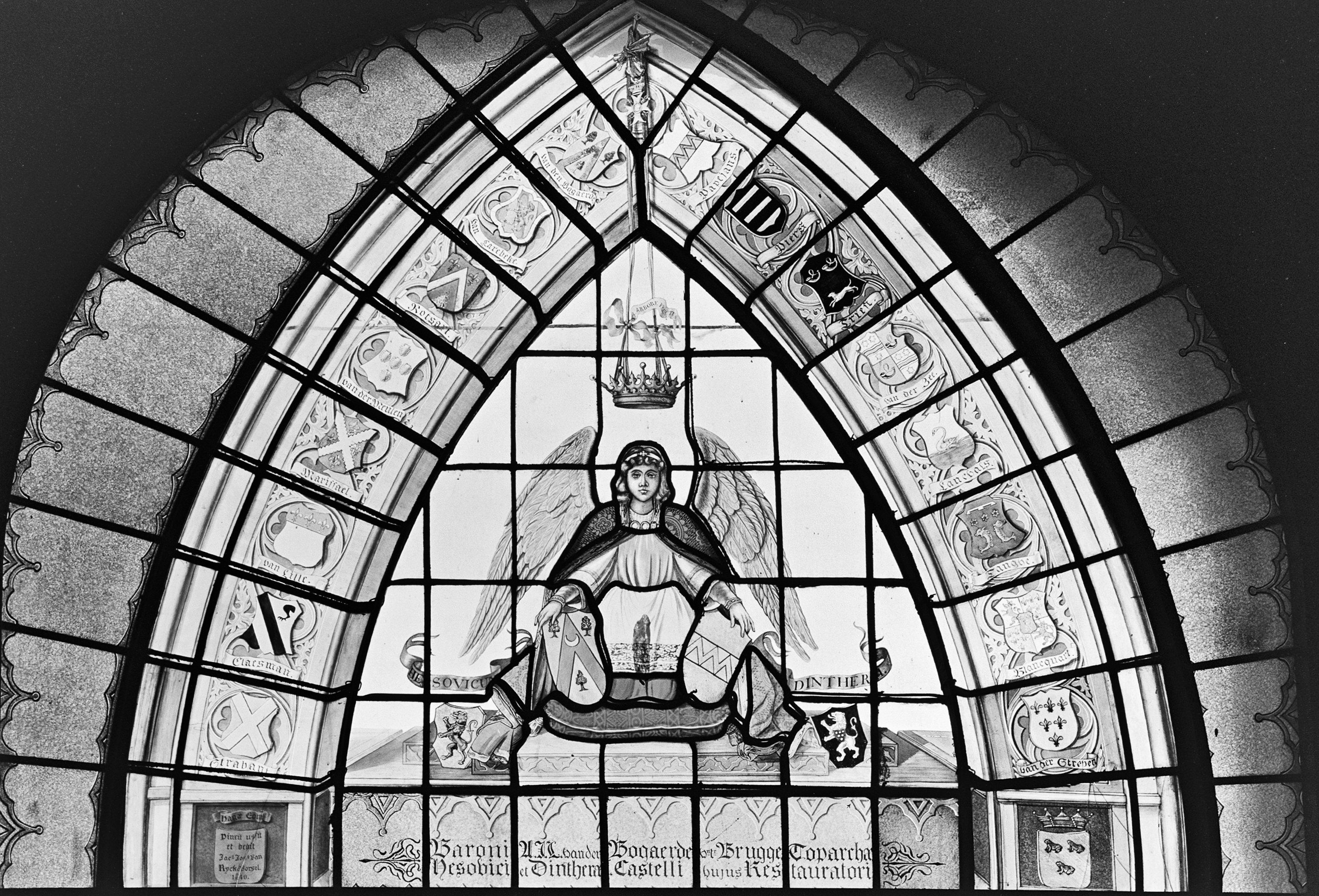 Kasteel Heeswijk: Interieur, glas in loodraam